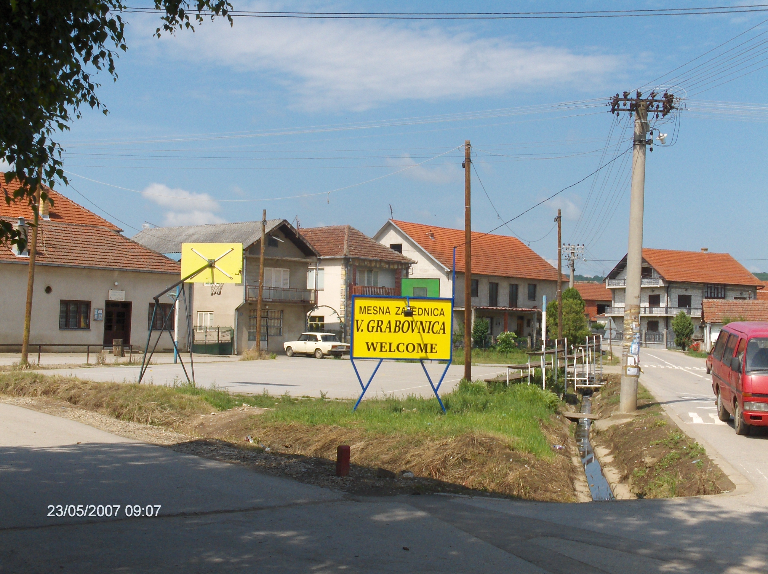 autor Dejan Ilić Matkin Mesna zajednica "centar" Velika Grabovnica opština Leskovac